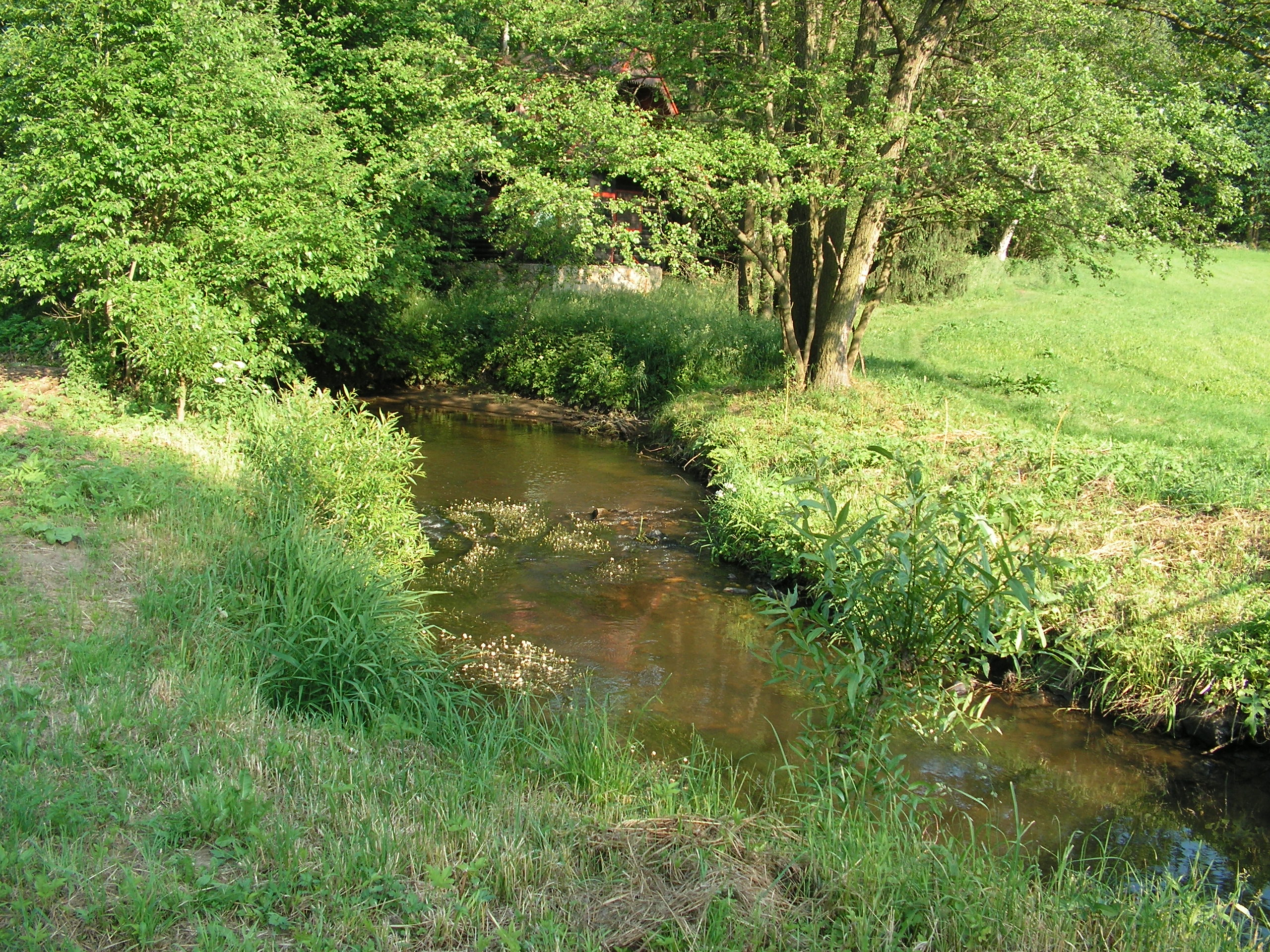 Úsobský potok severovýchodně od Klanečné nedaleko ústí do Sázavy v okrese Havlíčkův Brod